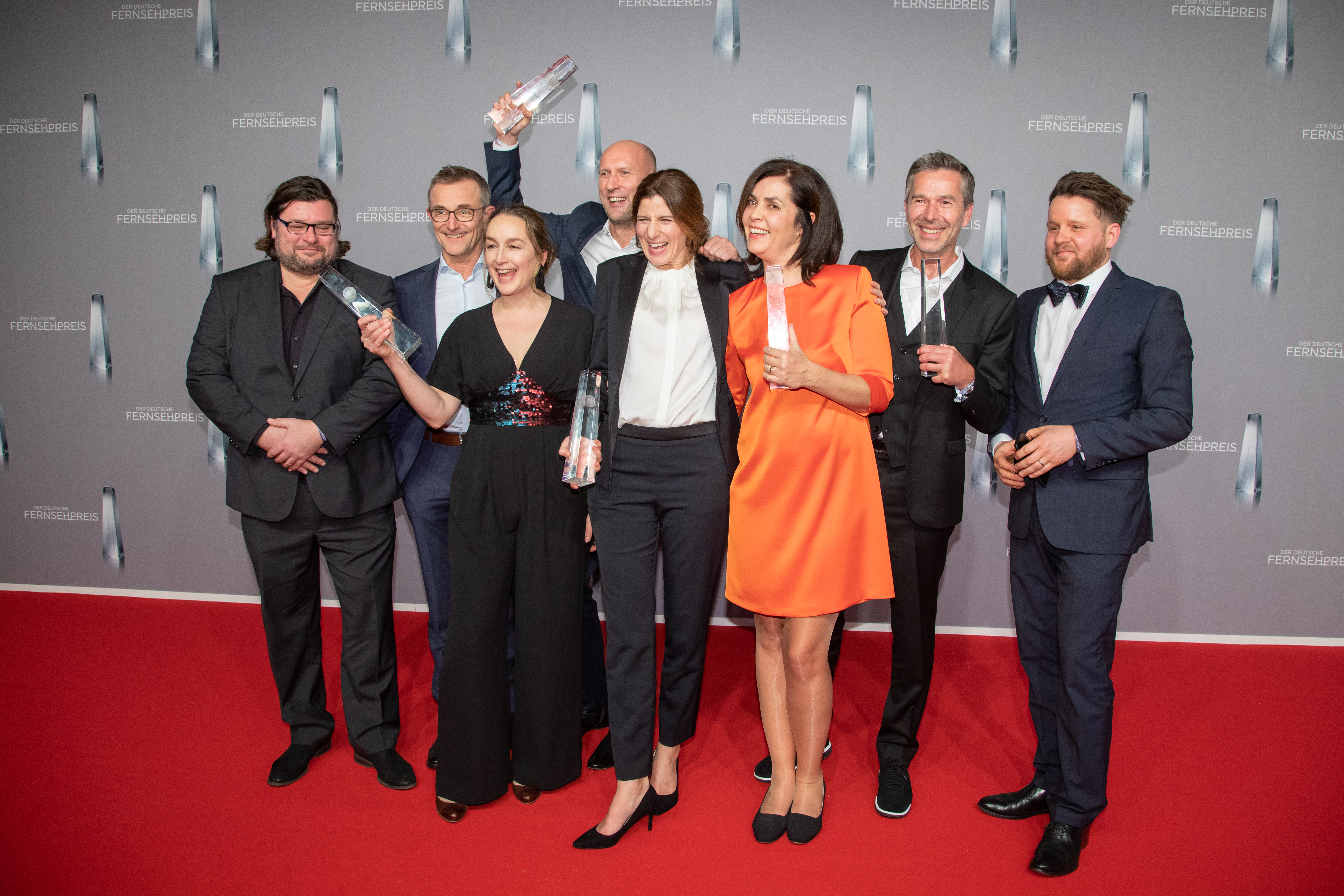 Terra X; Dirk Steffens beim Deutschen Fernsehpreis 2019 in der Düsseldorfer Rheinterrasse